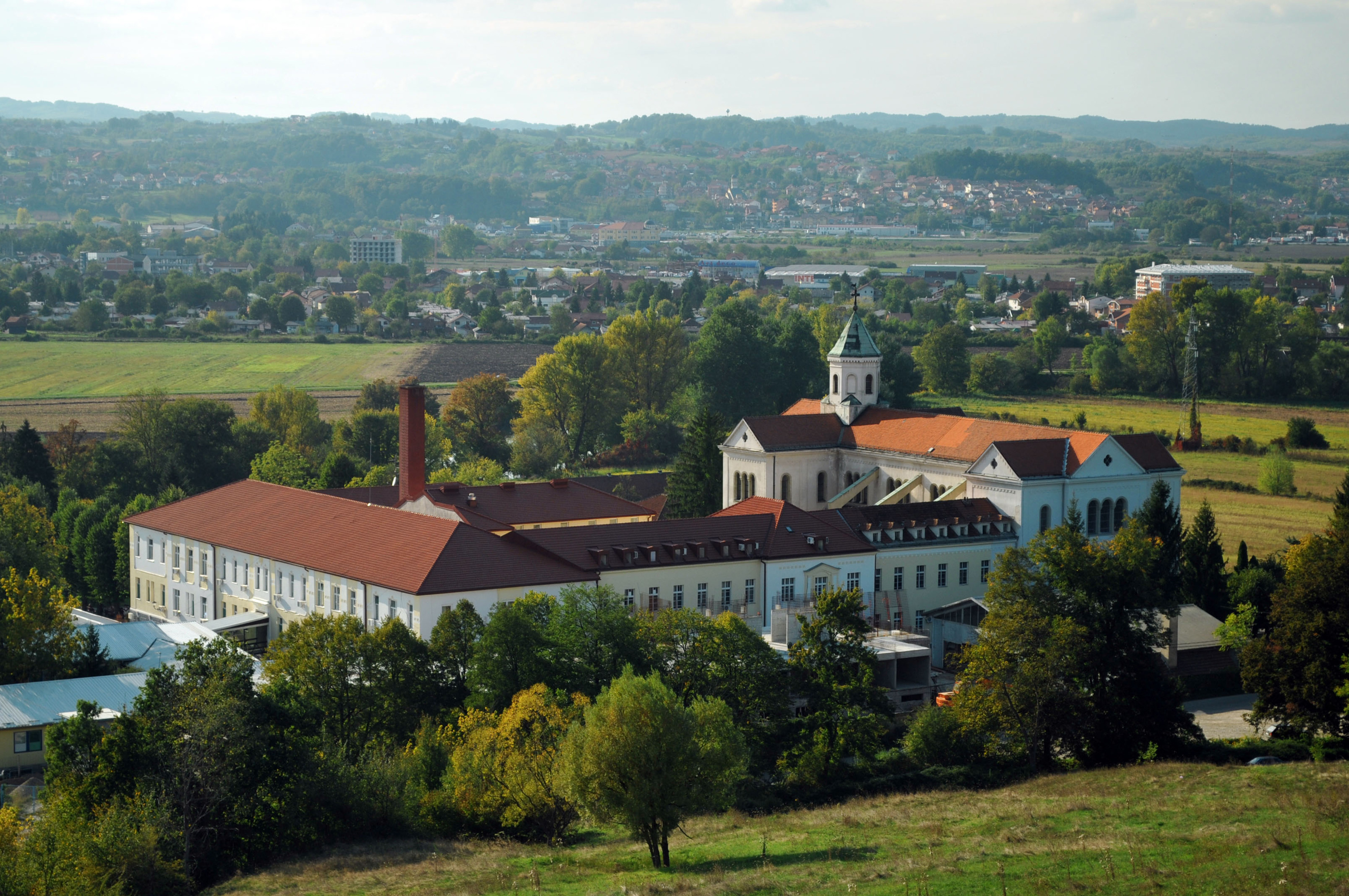 Samostan Marija zvijezda Trapisti Banja Luka Сликава е подигната во рамките на проектот „По трагата на душата 2015“.